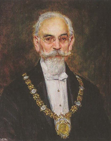 Porträt von Joseph Neuwirth (1855–1934), Rektor der Technischen Hochschule Wien